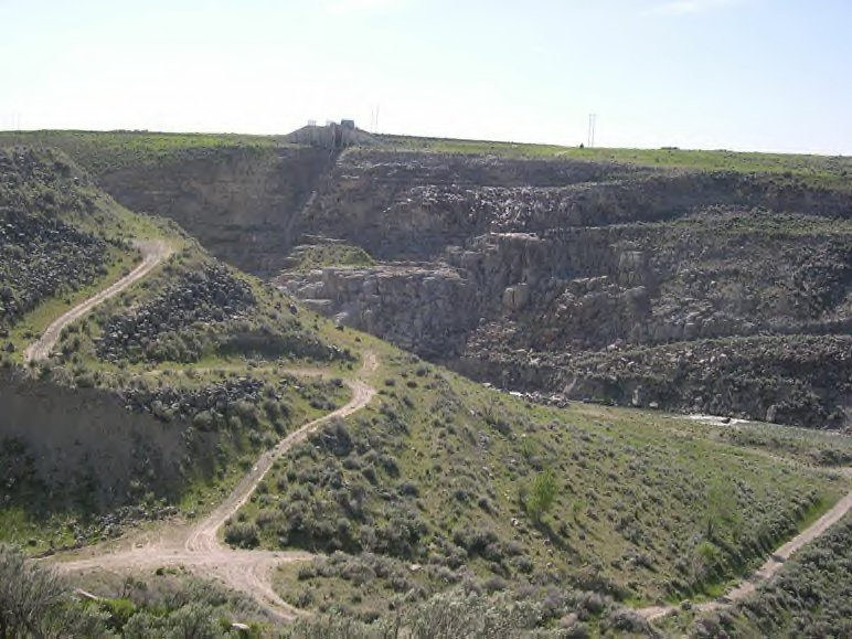 Foto des Teton-Staudammes heute